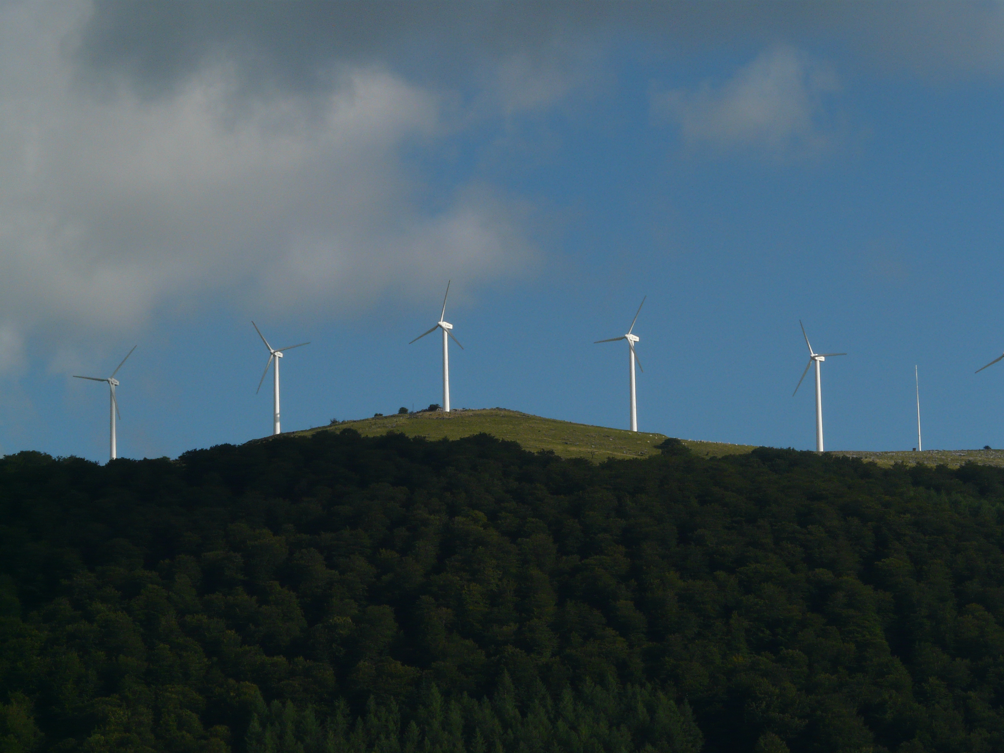 Parc eòlic de Leitza-Beruete des del coll d'Ezkurra, entre Leitza i Ezkurra.